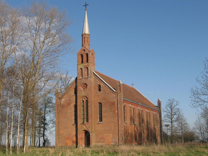 Vyžiai. Evangelikų liuteronų bažnyčia